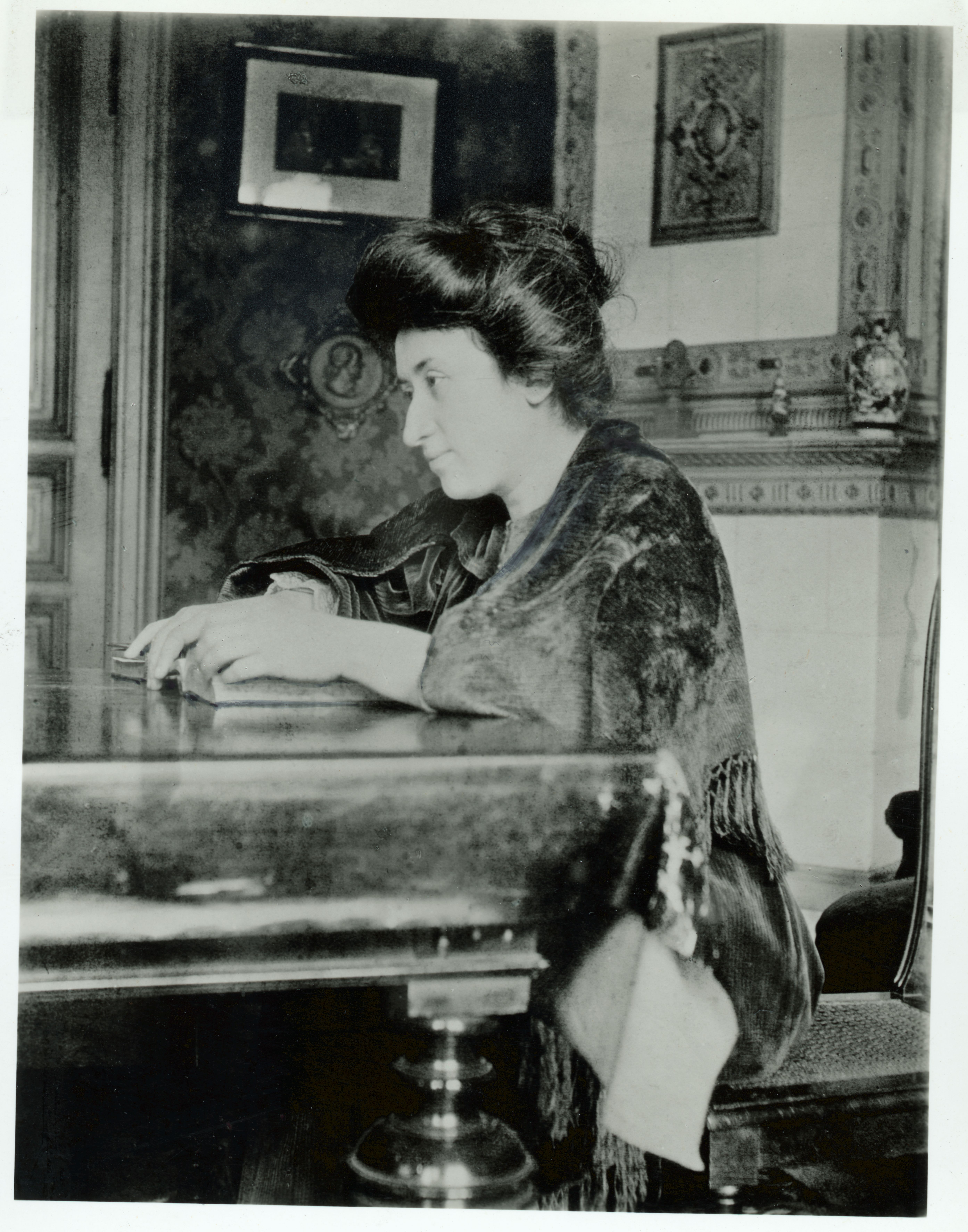 Rosa Luxemburg nella sua casa di Berlino, 1907